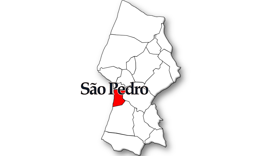 População